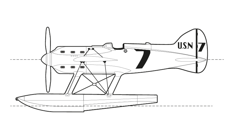 Williams Mercury Racer profil